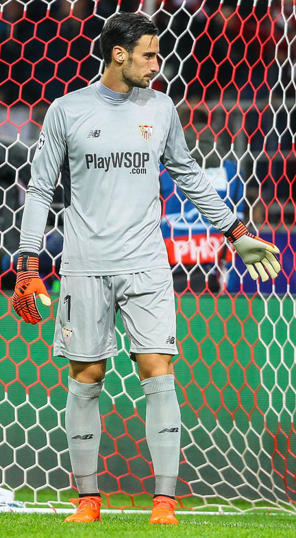 «Спартак» - «Севилья»